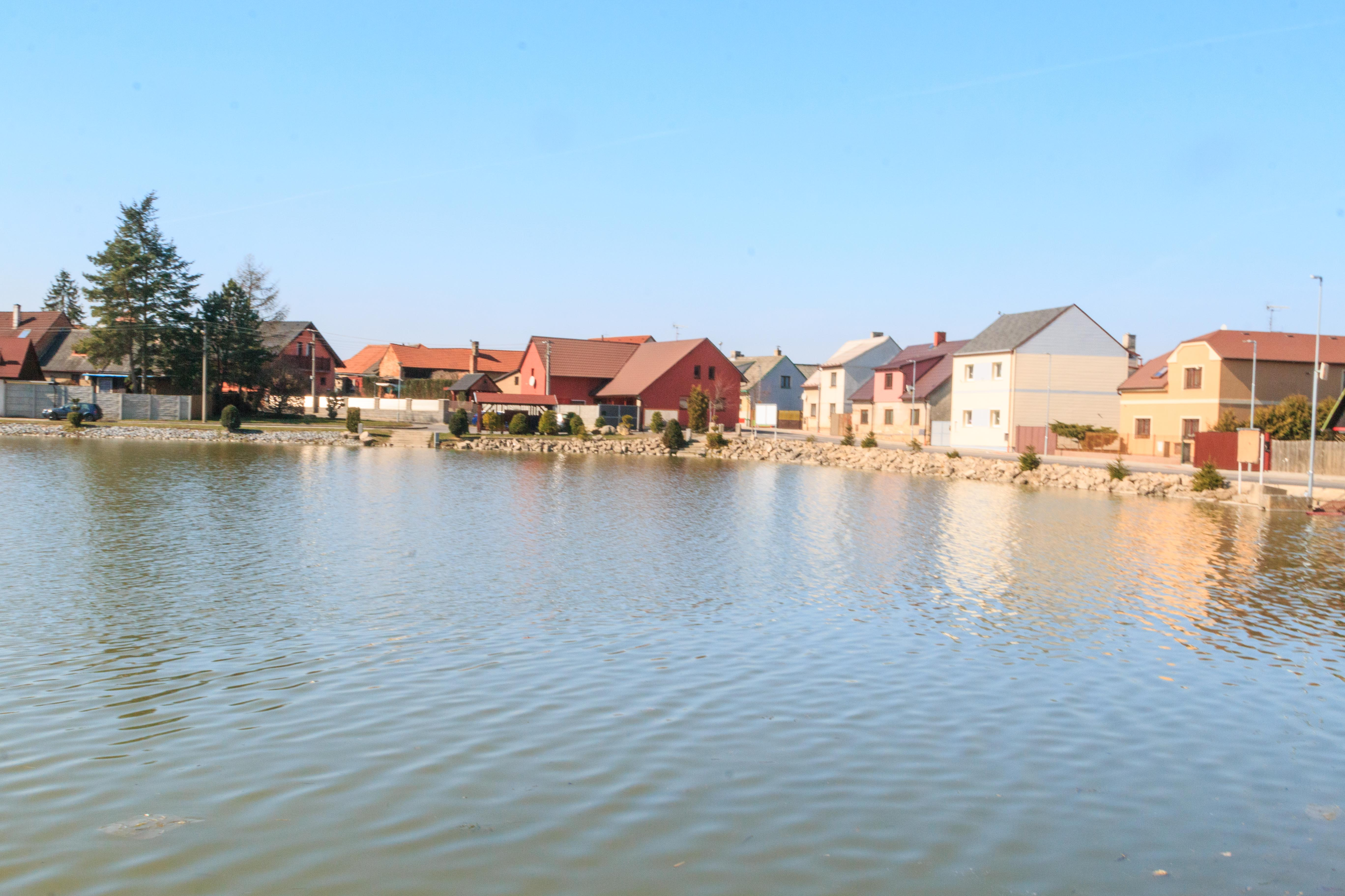 Pískový rybník v Dolním Bousově